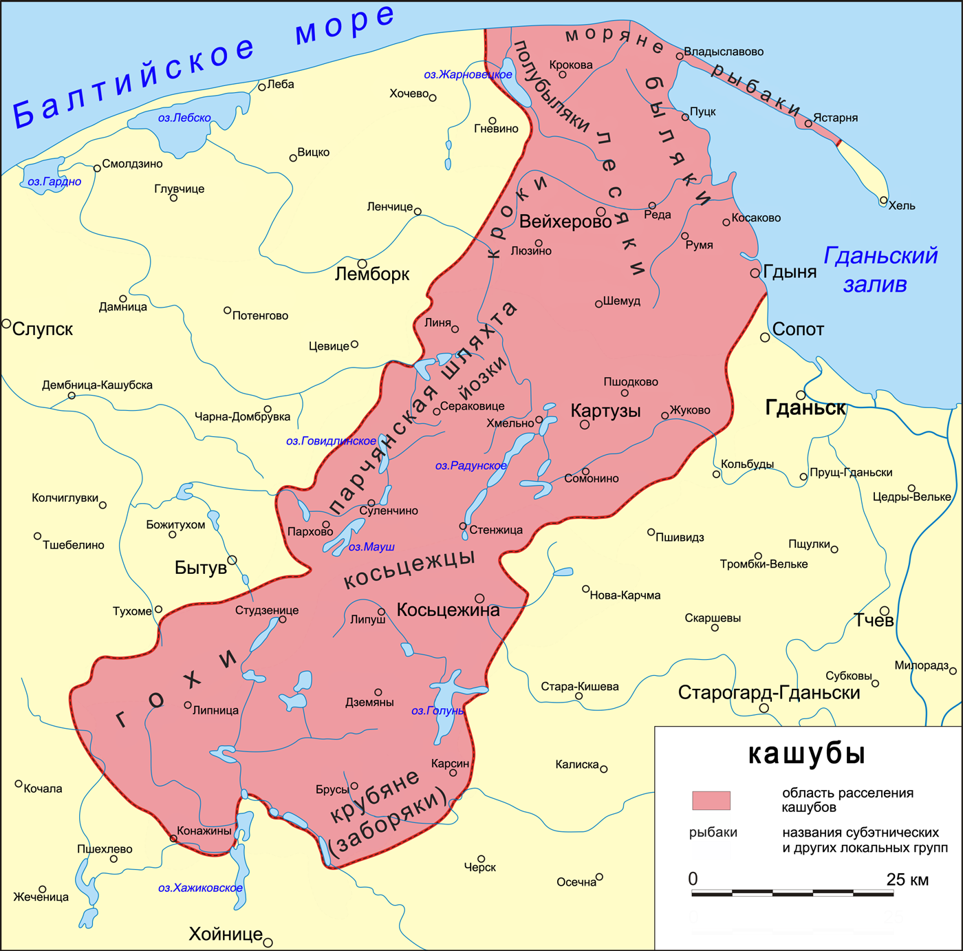 Карта размещения основных субэтнических и других этнолокальных групп кашубов